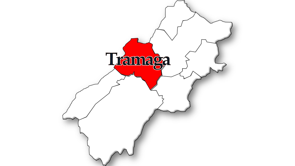 Evolução da População